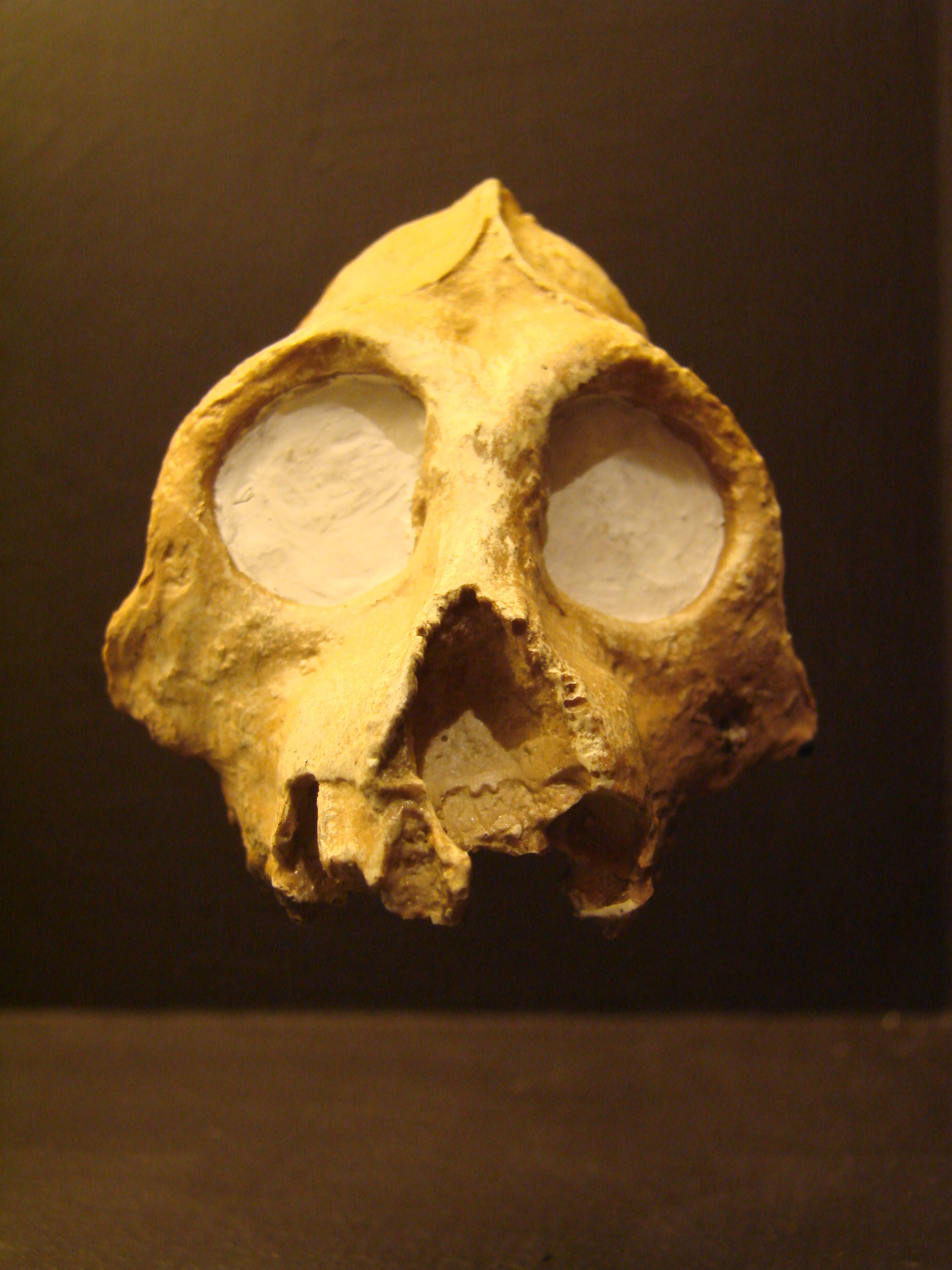 Muséum d'Anthropologie, campus universitaire d'Irchel, Université de Zurich (Suisse) : Aegyptopithecus